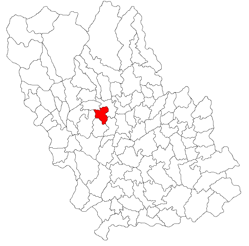 Categorie:Hărţi ale judeţului Prahova